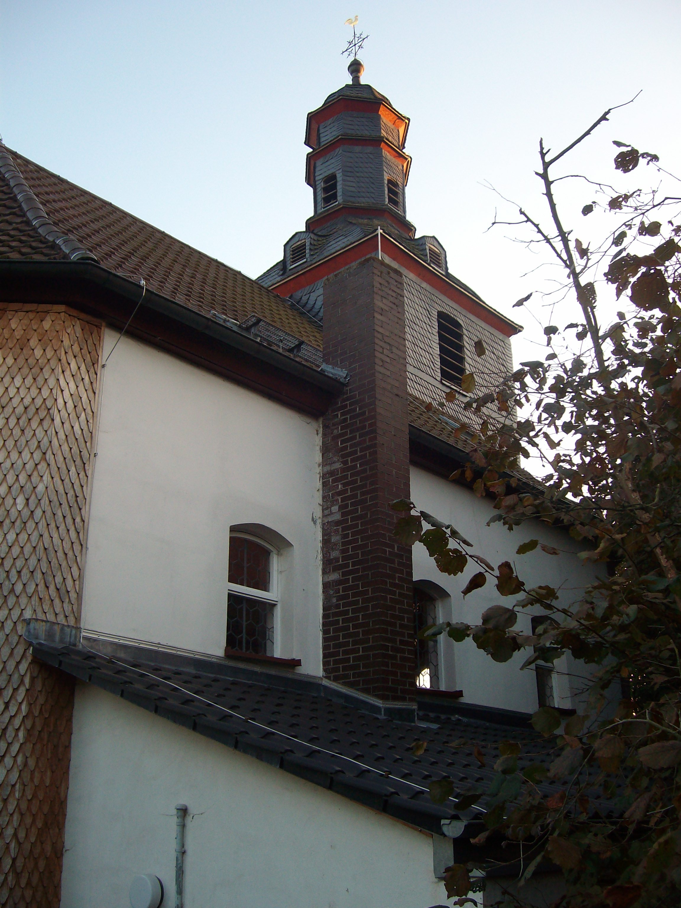 Nordseite der Evangelischen Kirche Lauter, Laubach, Landkreis Gießen, Hessen, Deutschland